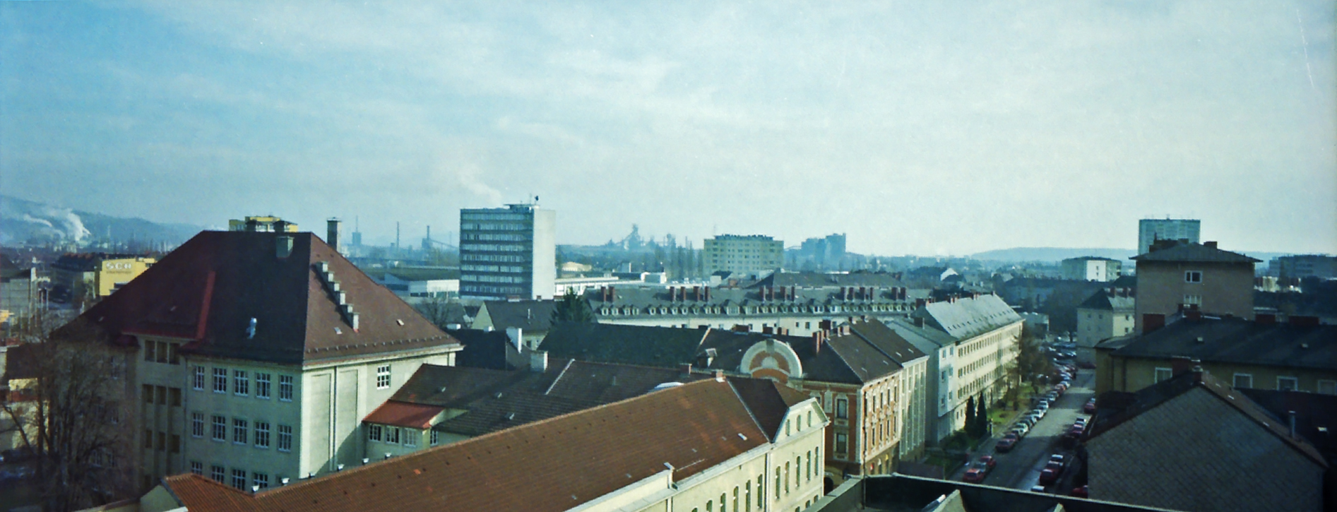 Blick über das ehemalige Linzer Makartviertel vom BBRZ-Gebäude aus (Grillparzerstraße 50). Am Horizont sind die Industrieanlagen in St. Peter zu sehen. Aufnahme mit einer Einwegkamera (Fuji QuickSnap Panorama). Scan von Negativ